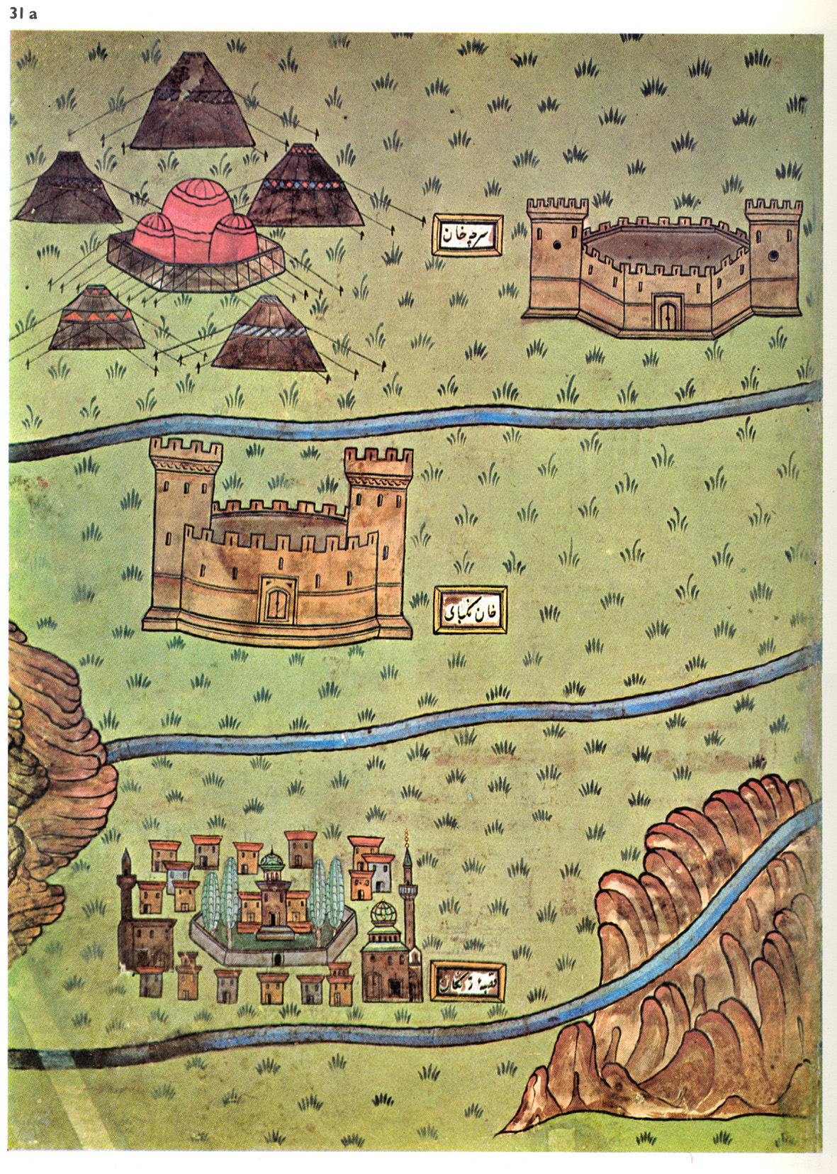 16th century map of Zanjan, Iran سرچه‌خان (خان سرچم)/ خان نکبای (نیک‌پی)/ قصبه زنگان / زنجان